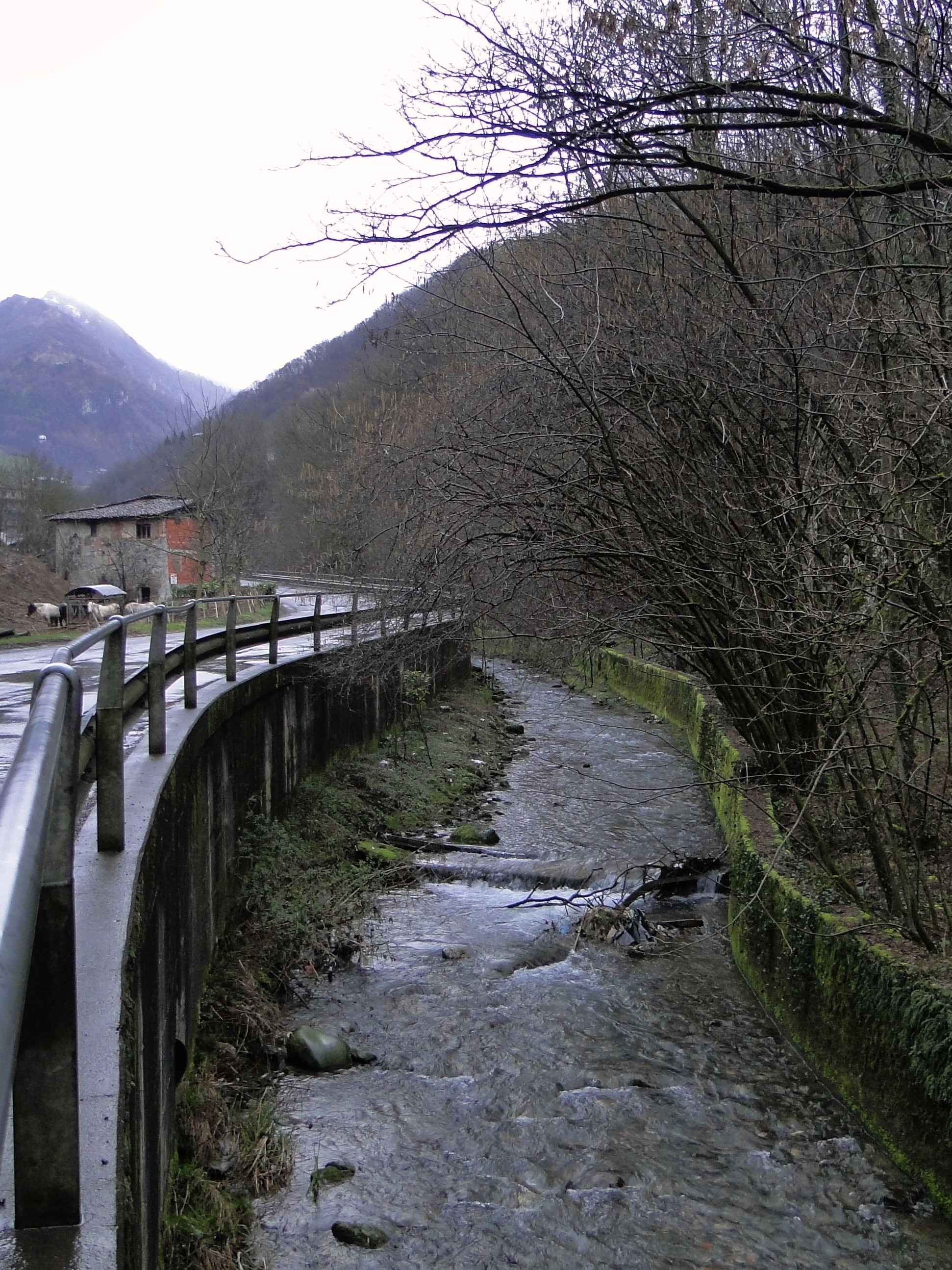 Torrente Romna. Gandino (BG)